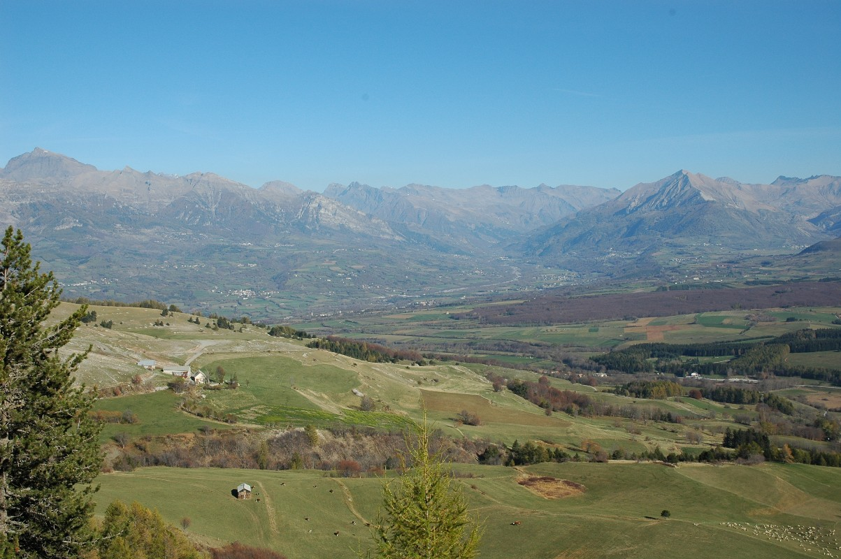 Vallée du Champsaur dans les Hautes-Alpes (05)